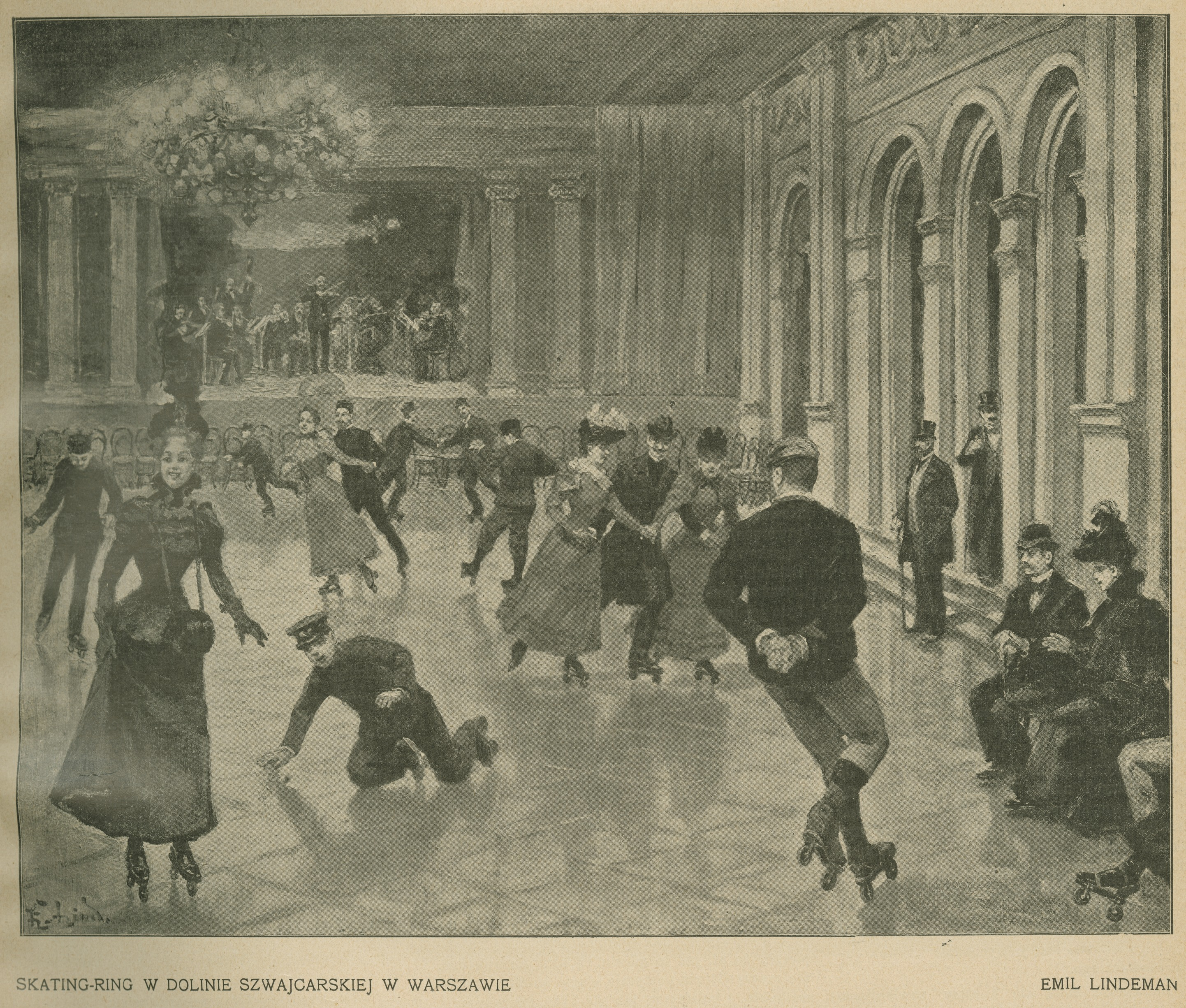 Skate-ring w Dolinie Szwajcarskiej w Warszawie